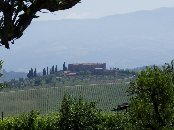 Panorama con il Castello di Colle Massari (GR)